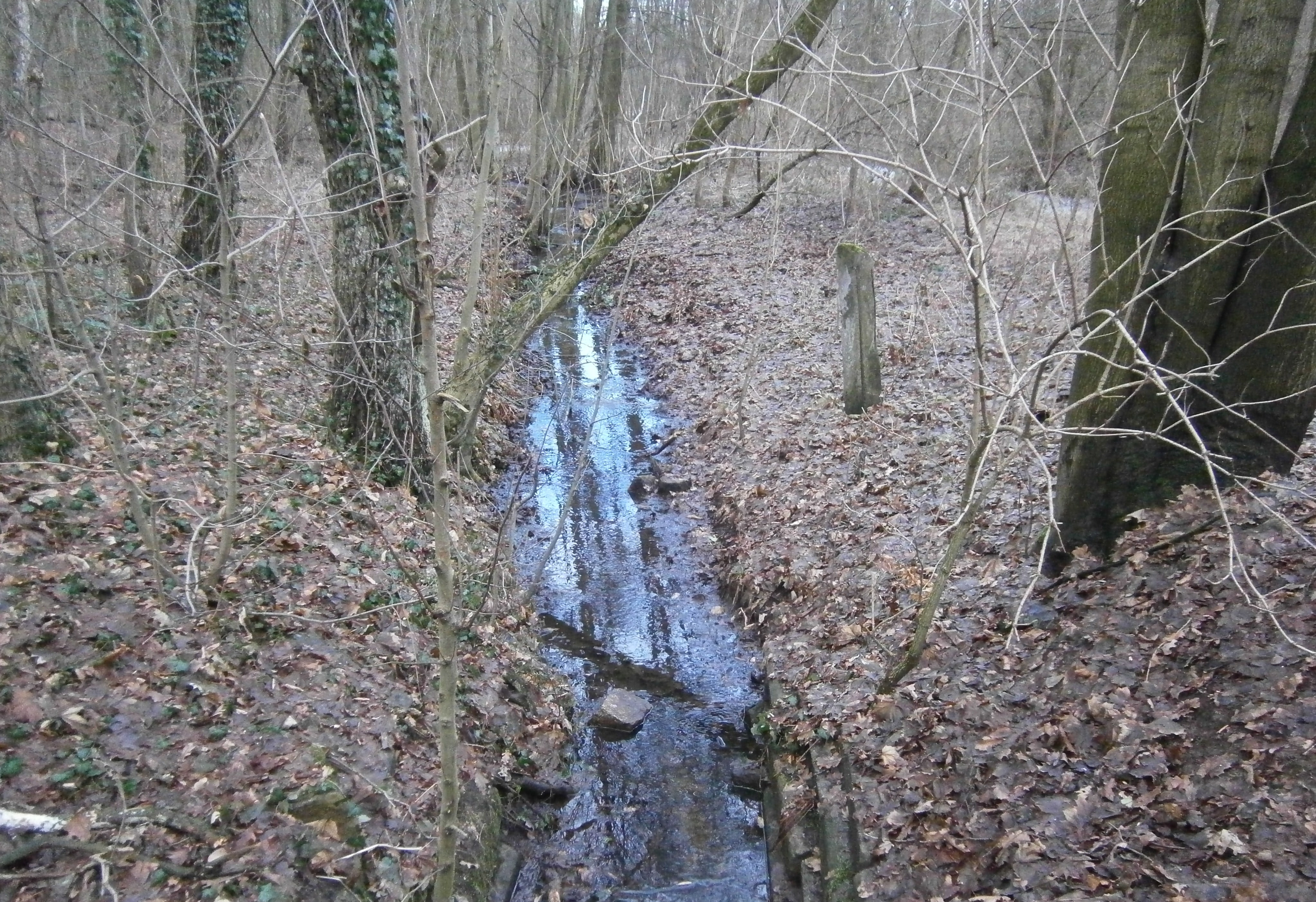 Das Bieselfließ liegt in der Bieselheide. Foto vom Steg über das Bieselfließ am östlichen Ende des Hubertuswegs in Berlin-Frohnau, an der Stadtgrenze zu Schönfließ (Mühlenbecker Land) und Hohen Neuendorf.